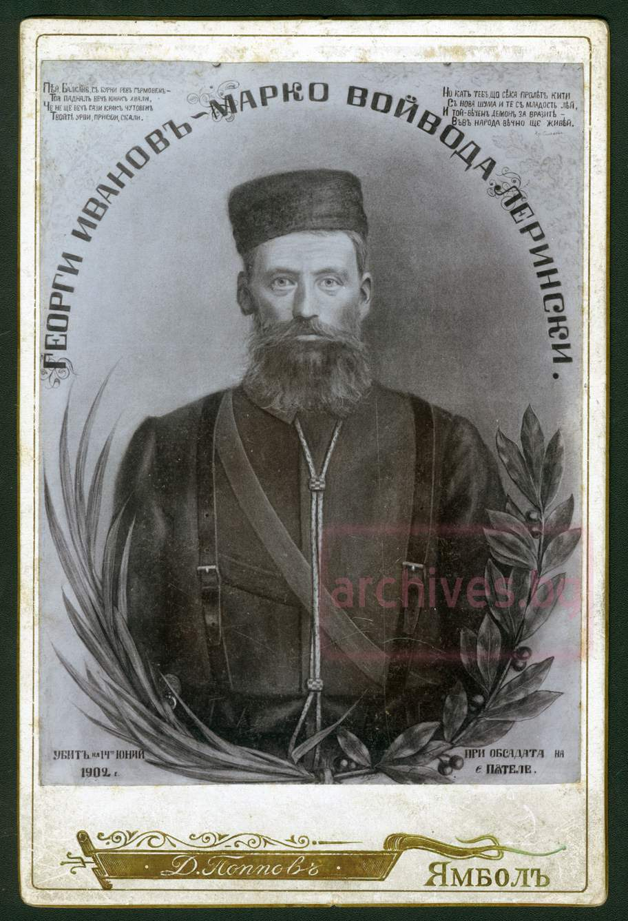 Портрет на Марко Лерински.